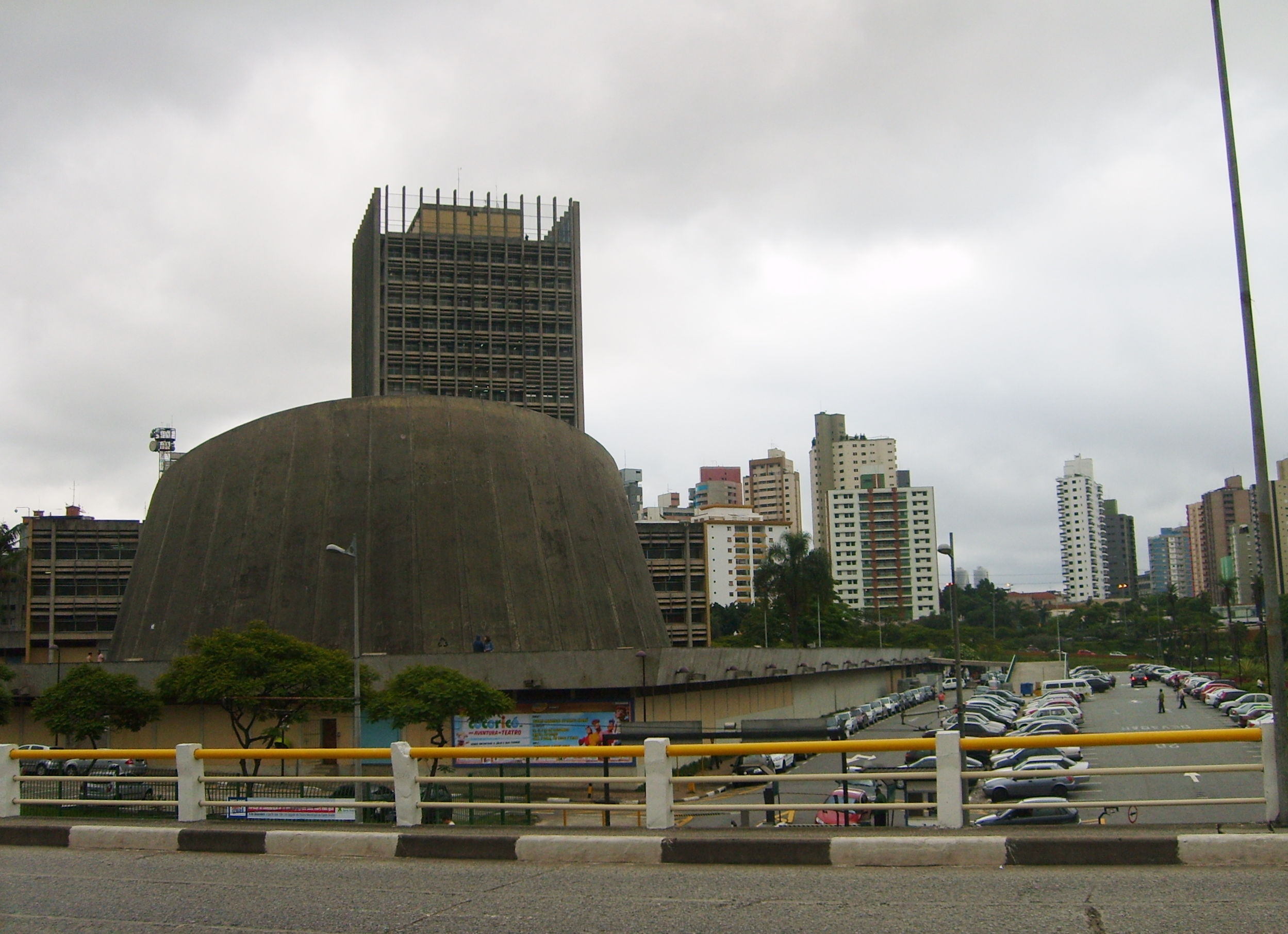 Paço Municipal(Prefeitura de Santo André